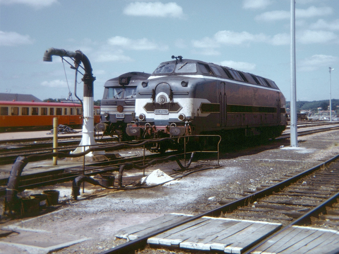 La CC 65017 au dépôt de Saintes (Charente-Maritime) le 17 juillet 1974.